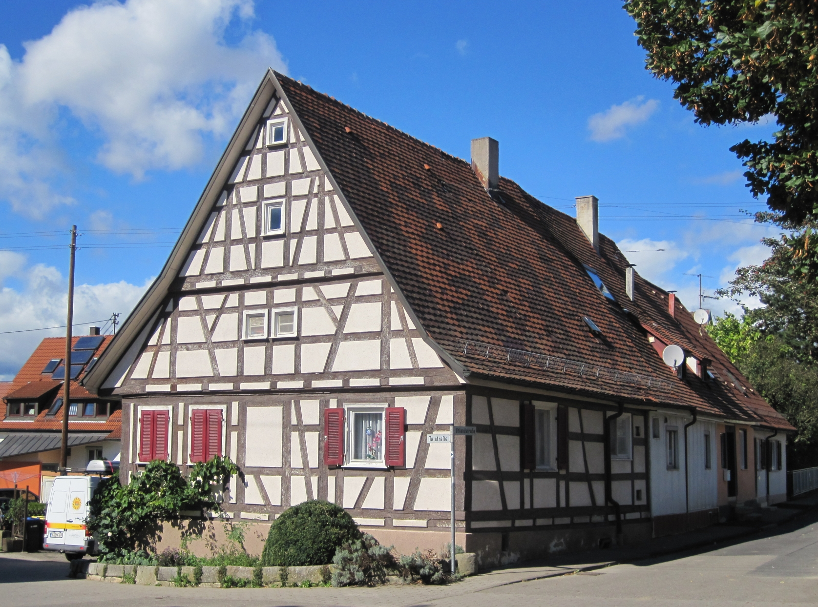 Fachwerkhaus in Leinfelden-Echterdingen, Stadtteil Unteraichen, Uhlandstraße 2. Dieses Haus wird im Volksmund „d’Kasern“ (die Kaserne) genannt, da hier sehr viele Menschen auf engstem Raum wohnten. Neben den Wohngebäuden waren auch die Wirtschaftsgebäude von bis zu vier, oft kinderreichen Familien auf der rückwärtigen Hausseite zusammengebaut, so dass das Anwesen einer kleinen Kaserne glich.